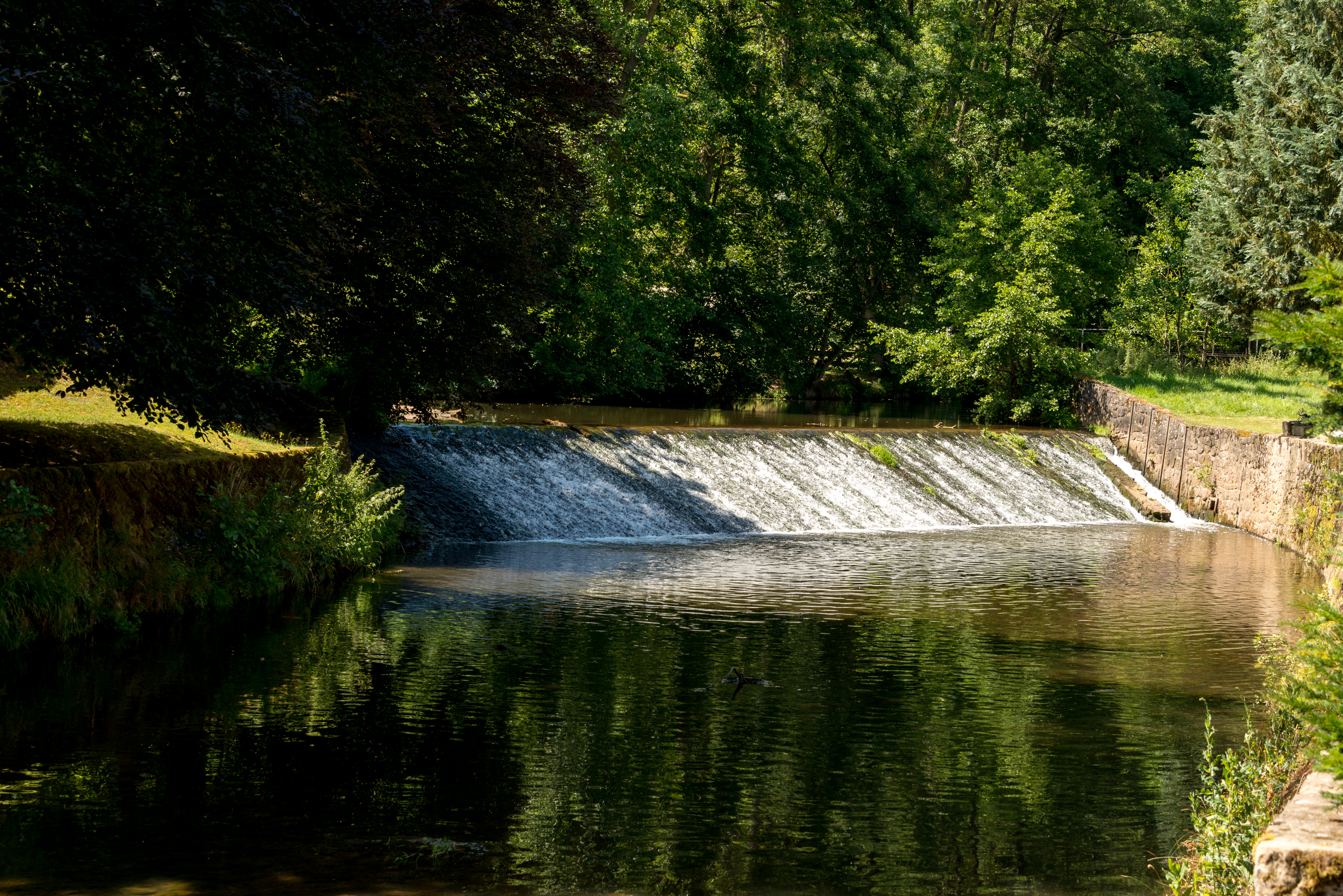 D'Wier op der Atert bei der Tussengsmillen zu Useldeng.